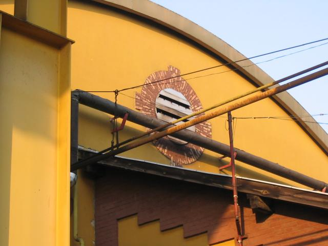 Istvántelki Főműhely szellőzője, Budapest IV.